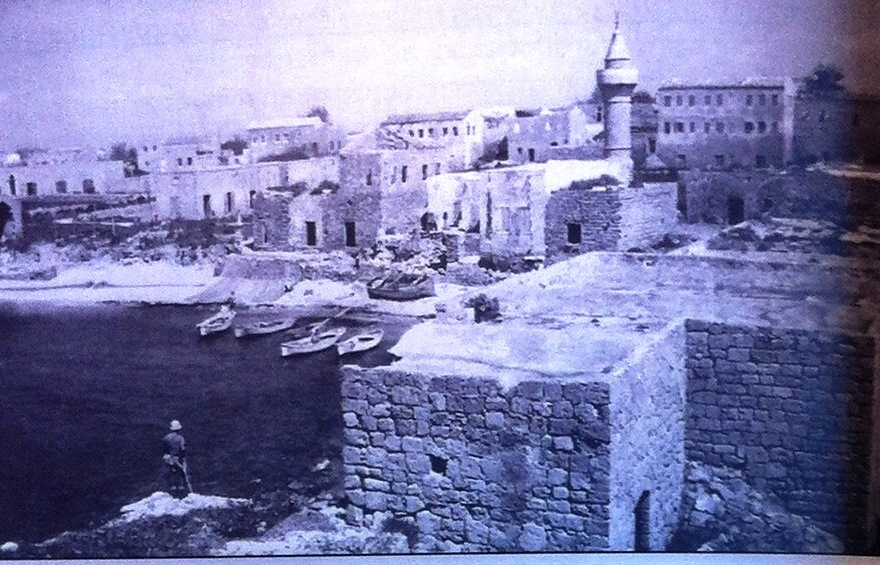 היישוב הבוסני - מבט מבית המושל